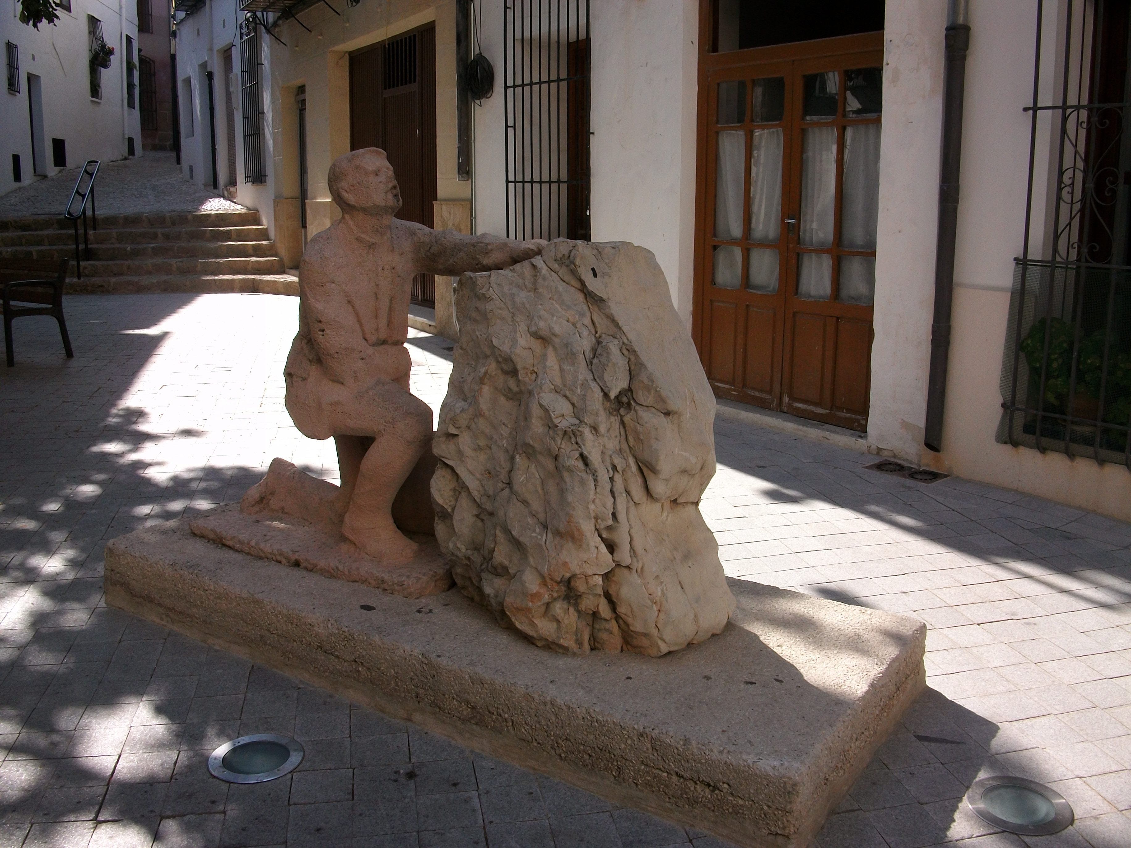 Monument al Riberer, Benissa, Marina Alta, País Valencià.